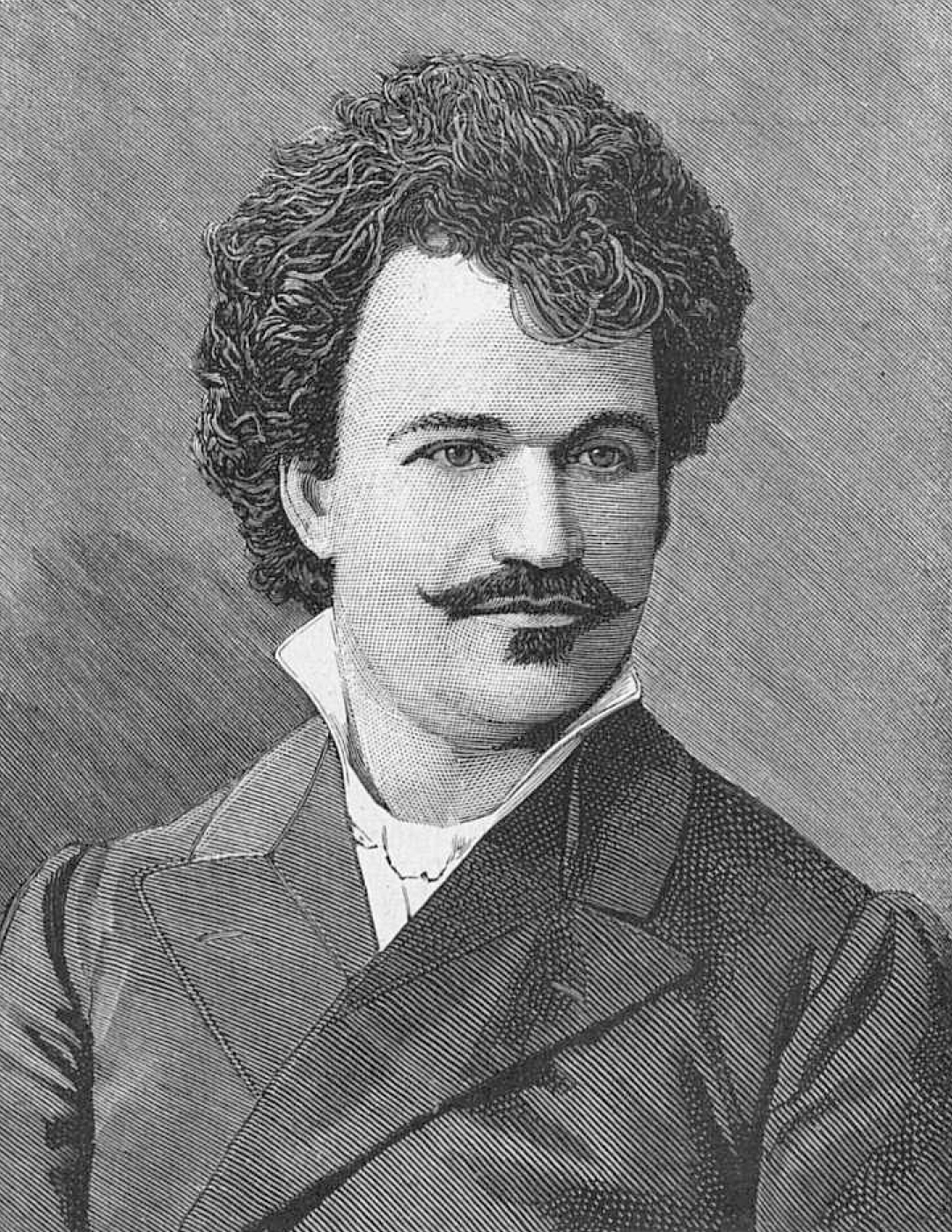 Усатов Дмитрий Андреевич, русский оперный певец (тенор), педагог